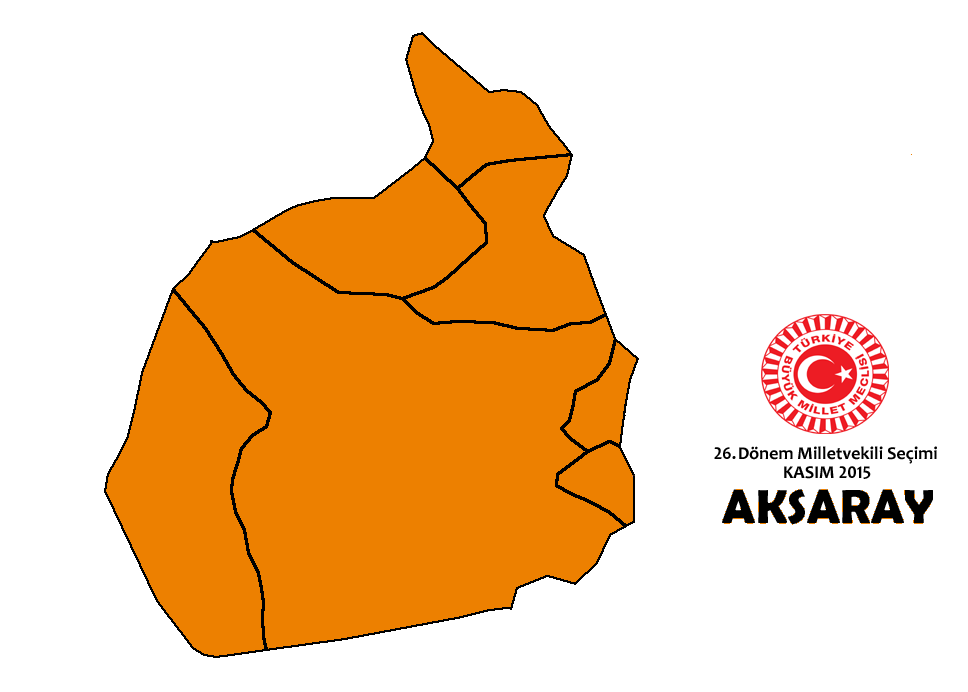 Kasım 2015 seçimleri